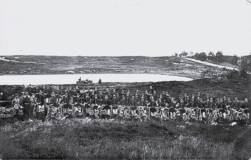 Radfahr-Abteilung des Lauenburgischen Jäger-Bataillons Nr. 9